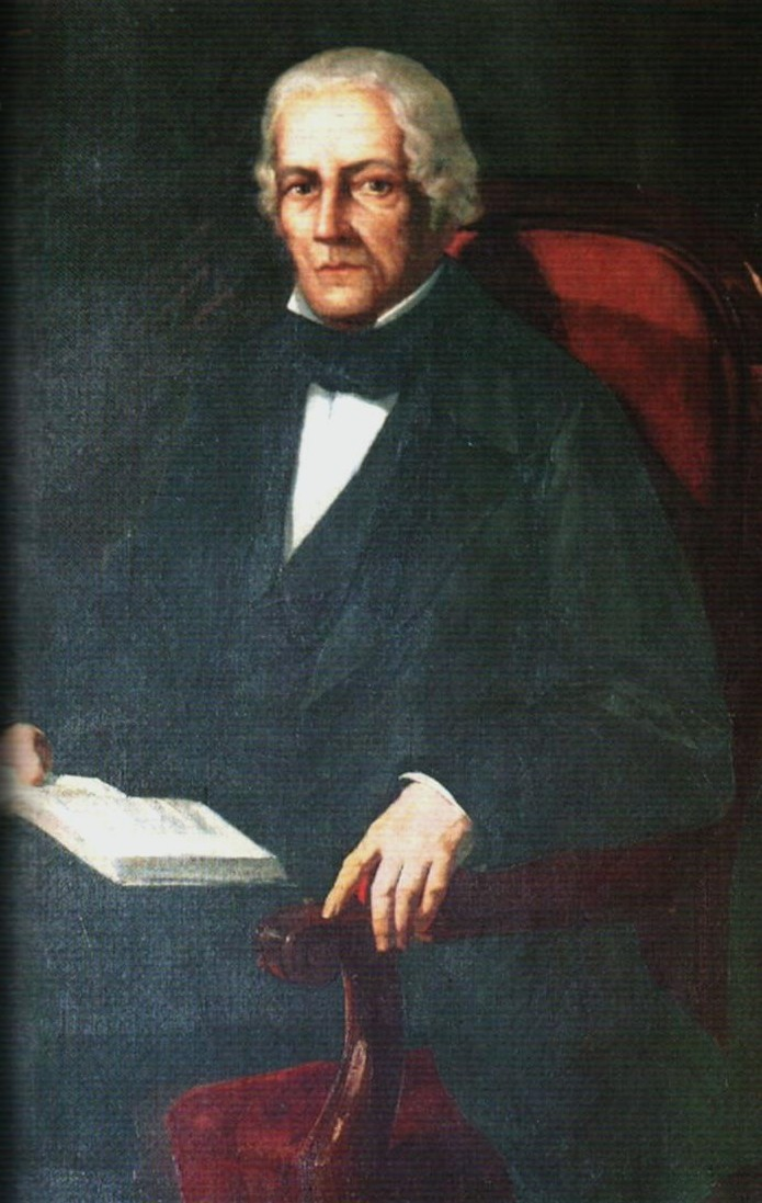 Diego Bautista Urbaneja. Oleo sobre tela Coleccion del Ministerio de Relaciones Exteriores. Caracas - Venezuela